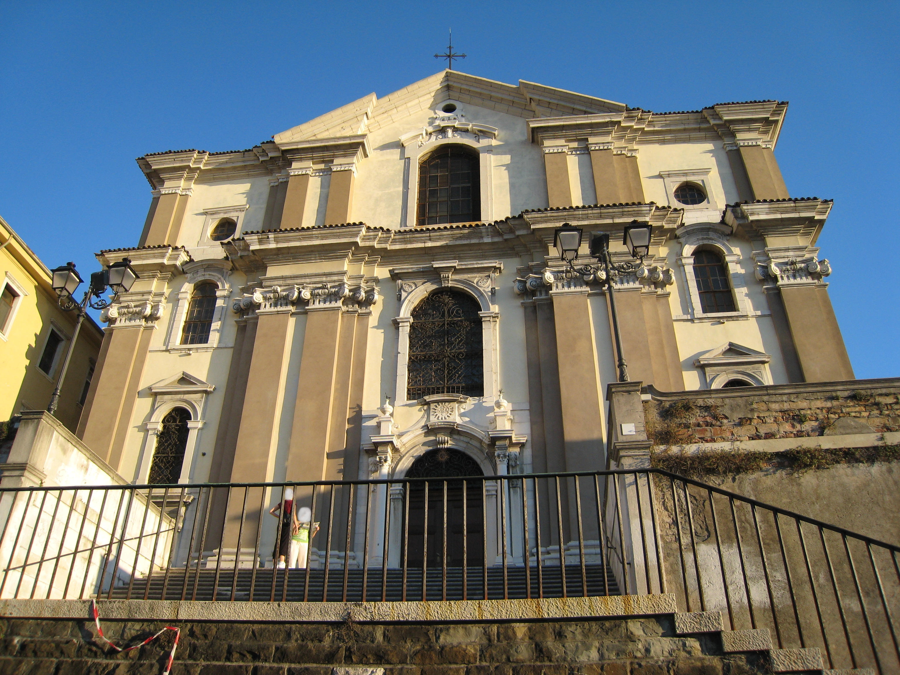 Italy-Trieste. Chiesa di Santa Maria Maggiore